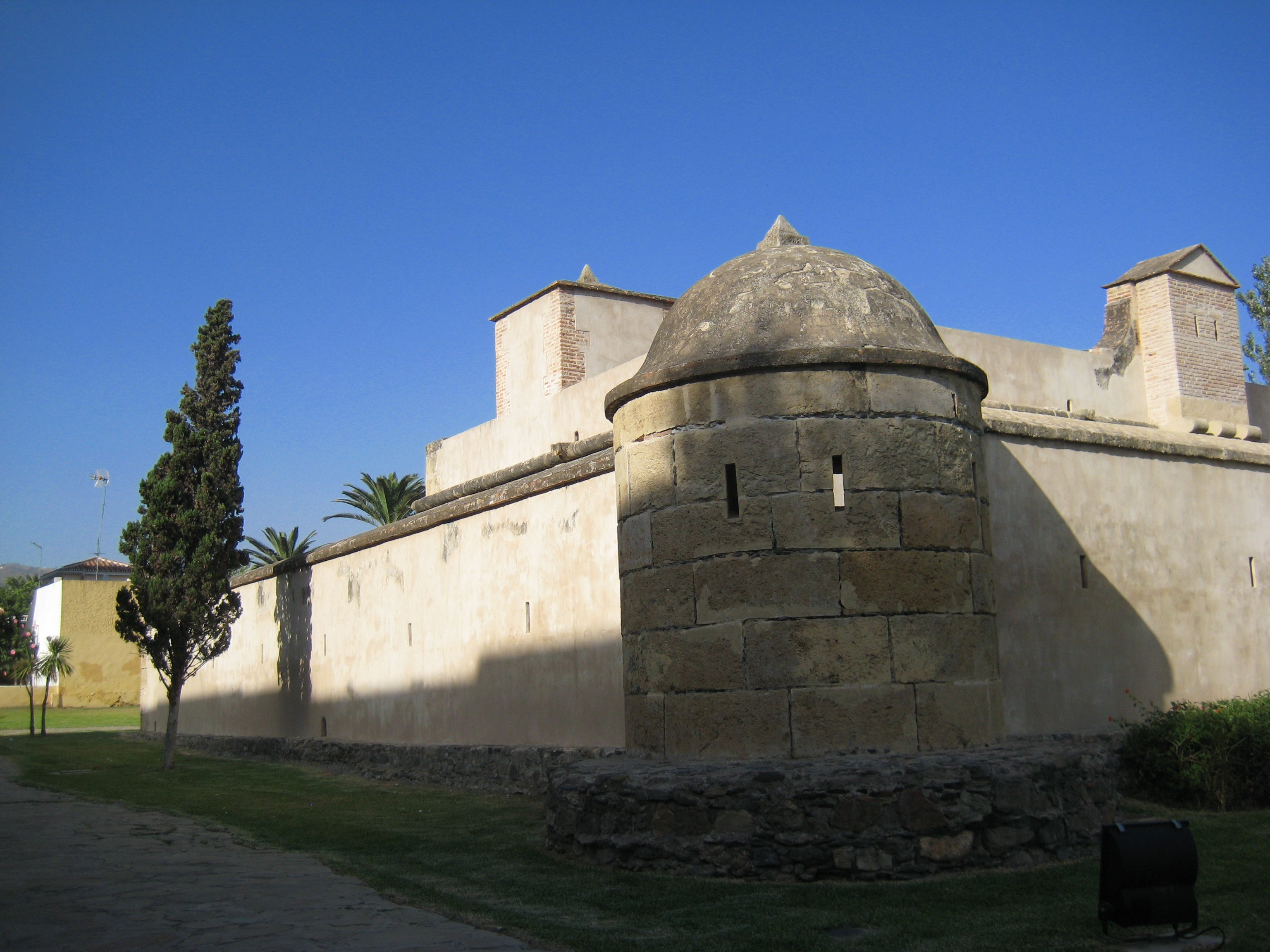 Castillo de Bezmiliana, Rincón de la Victoria, Málaga, España.